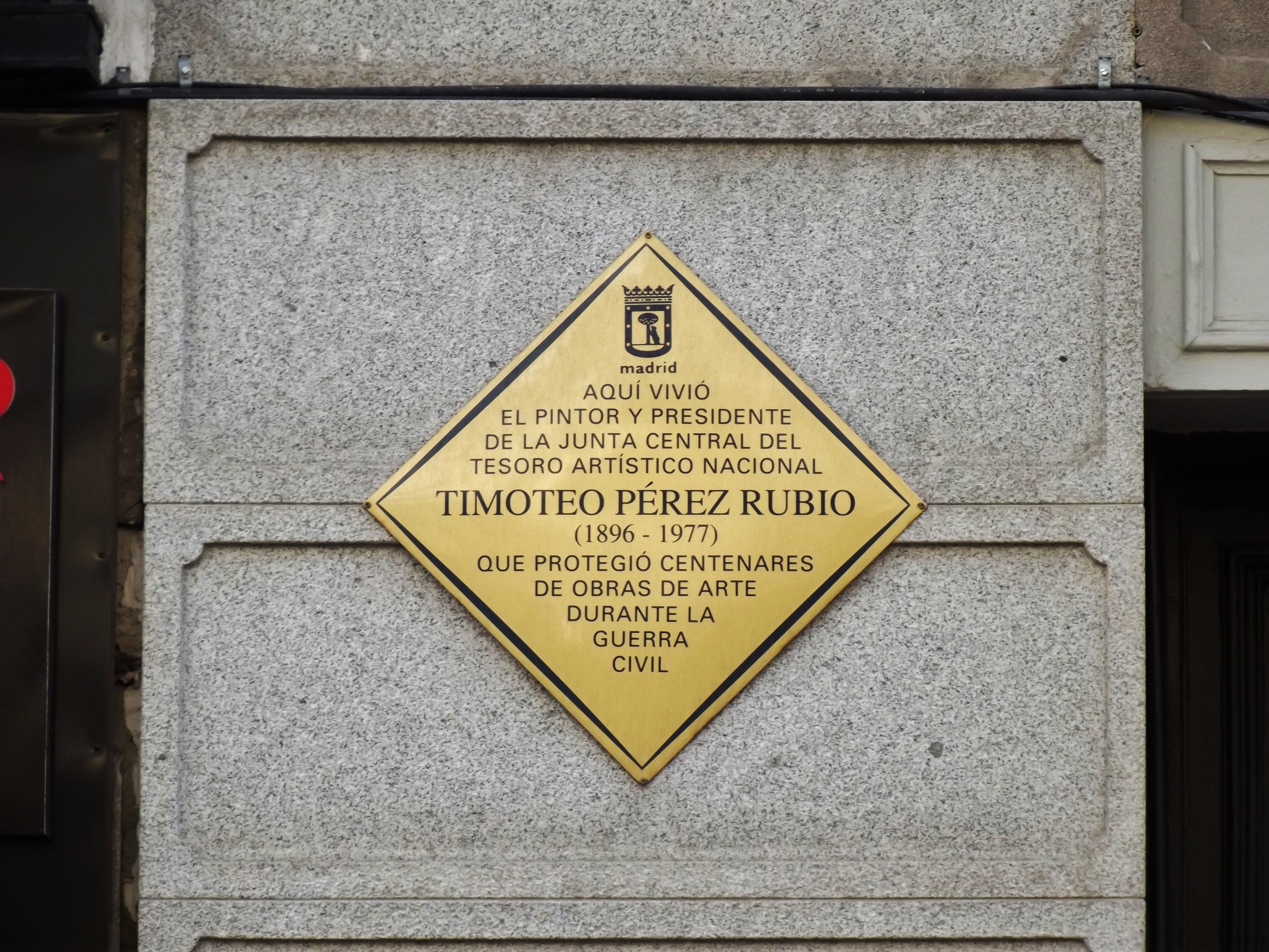 Placa conmemorativa de la residencia de Timoteo Pérez Rubio en la casa n.º 5 de la Plaza Tirso de Molina de Madrid, colocada por el Ayuntamiento de la capital en 2010. Timoteo Pérez Rubio (1896–1977) Alternative names Timoteo Pérez RubioDescription painterDate of birth/death 24 January 1896 8 August 1977 Location of birth/death Oliva de la Frontera Rio de JaneiroWork period1915-1977Work location Madrid, Río de JaneiroAuthority control : Q6147067 VIAF: 112463577 ISNI: 0000 0000 8409 8236 ULAN: 500037877 LCCN: n81046280 GND: 1057665088 WorldCat creator QS:P170,Q6147067